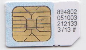 SKAN KARTY SIM.